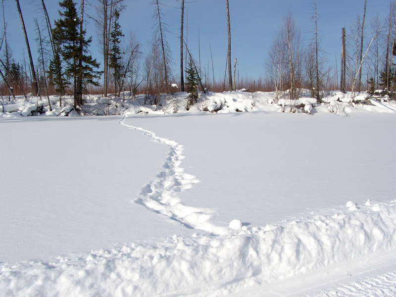 Тунгусский заповедник: Заповедник расположен в центральной части Средне-Сибирского плоскогорья в междуречье Подкаменной Тунгуски и ее правого притока Чуни на территории Тунгусско-Чунского района Эвенкийского автономного округа,Эвенкийский муниципальный район, Красноярский край This image is related to the protected area of Russia number 2400227